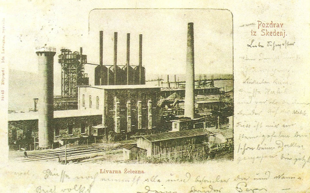 Razglednica Škednja.